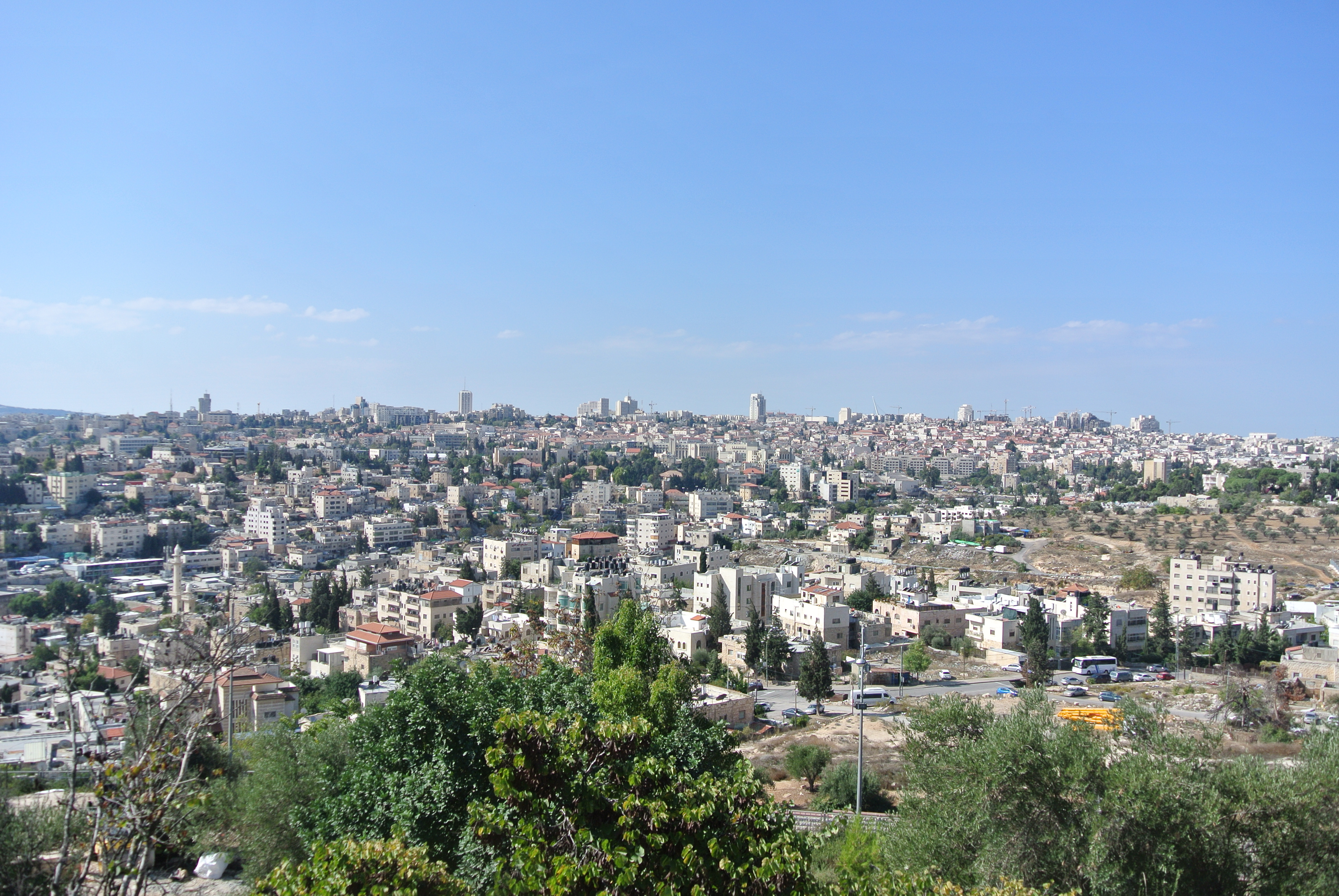 DSC_7565 Jerusalem